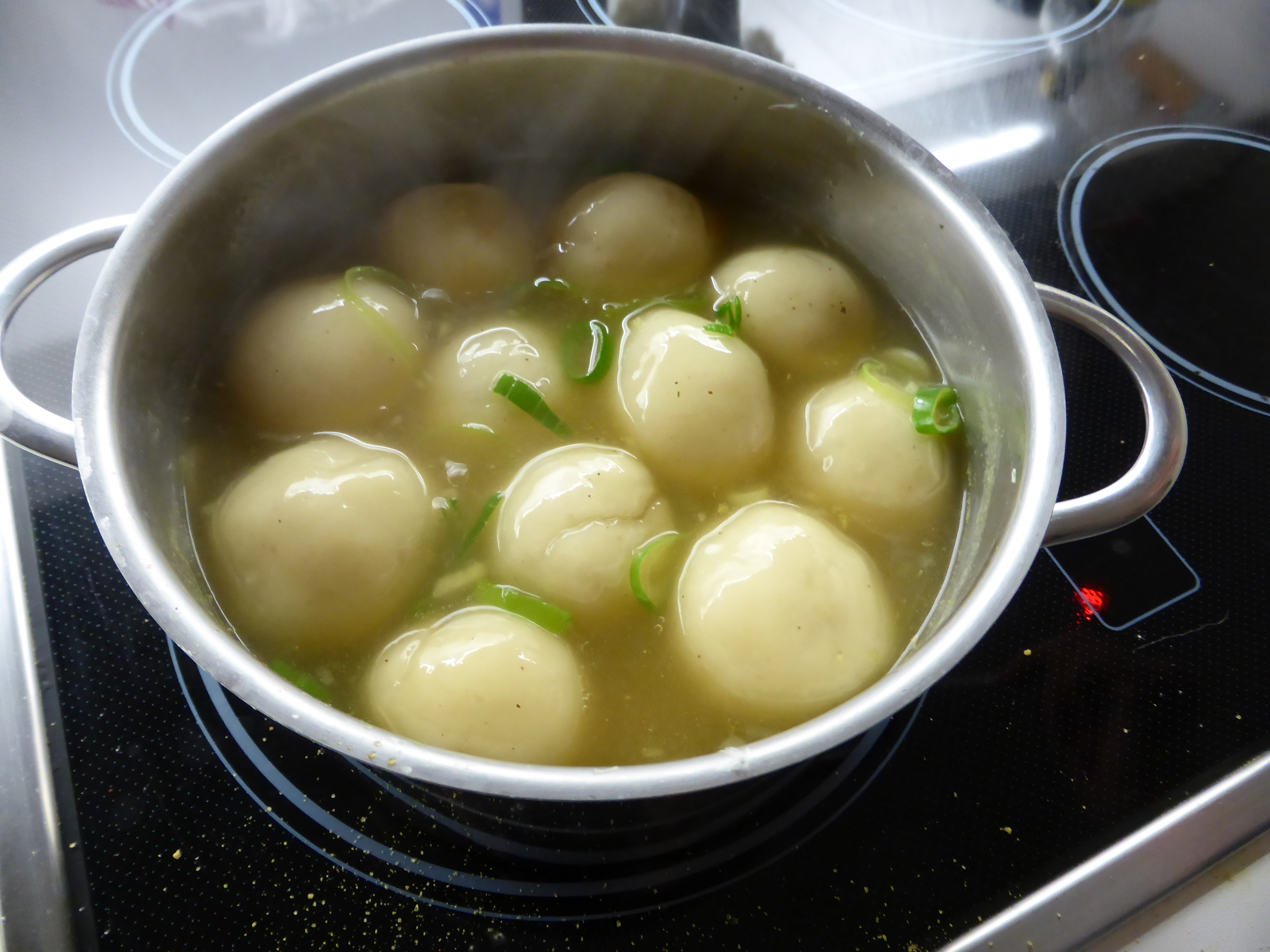 Cilok